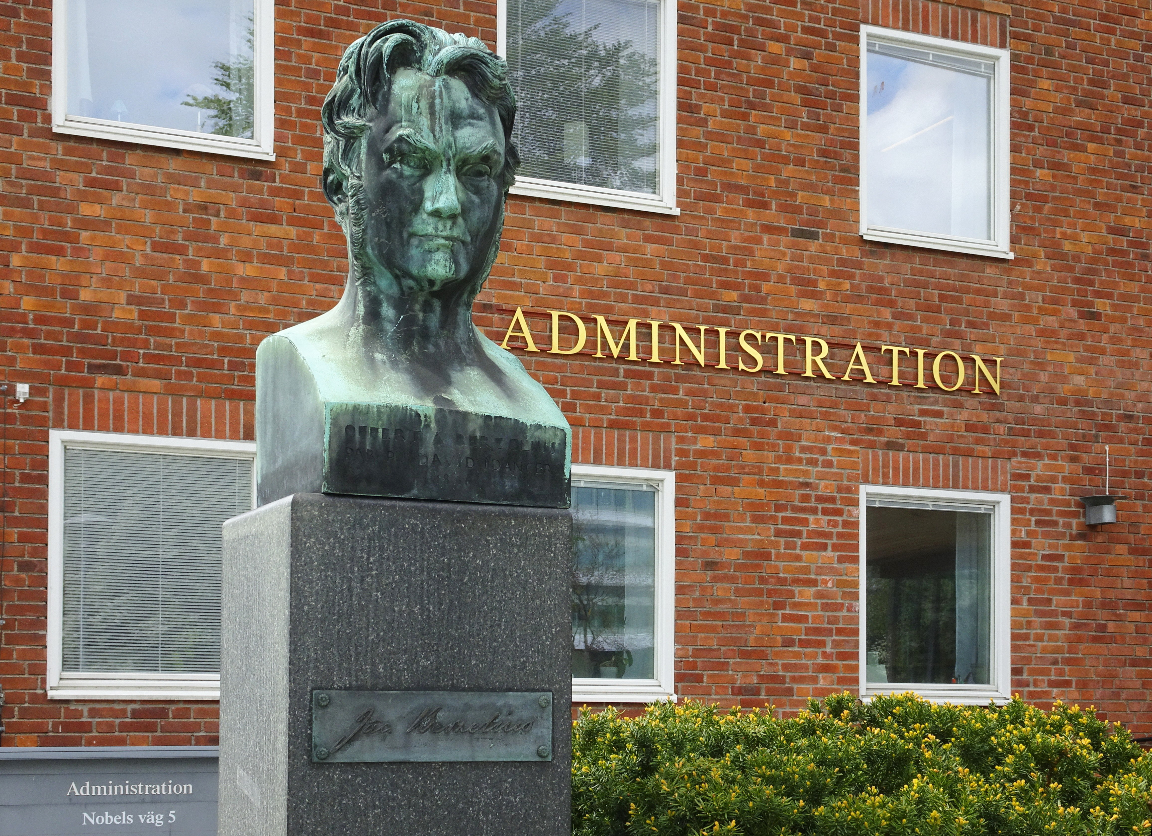 Campus Solna, Nobels väg 5. Ursprungligen Byggnaden för kemiska institutionen uppförd 1950. Sedan 1997 Karolinska Institutets administration, arkitekt Ture Ryberg. Jöns Jacob Berzelius byst vid huvudentrén.